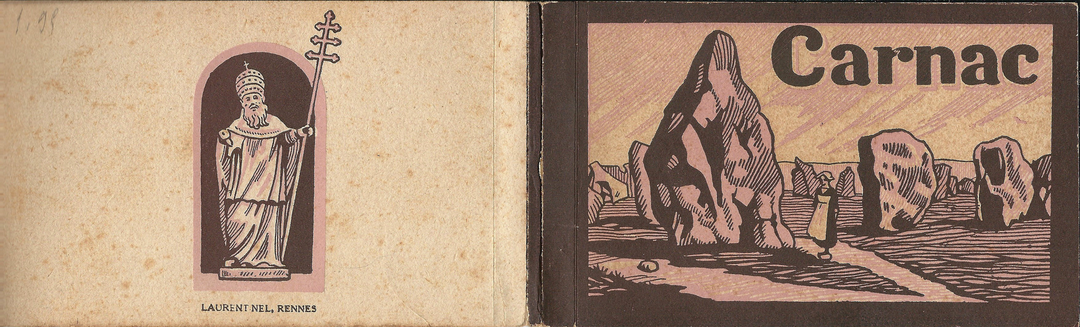 Couverture du carnet de 10 cartes postales de Carnac (Morbihan, France), éditions Laurent Nel à Rennes.